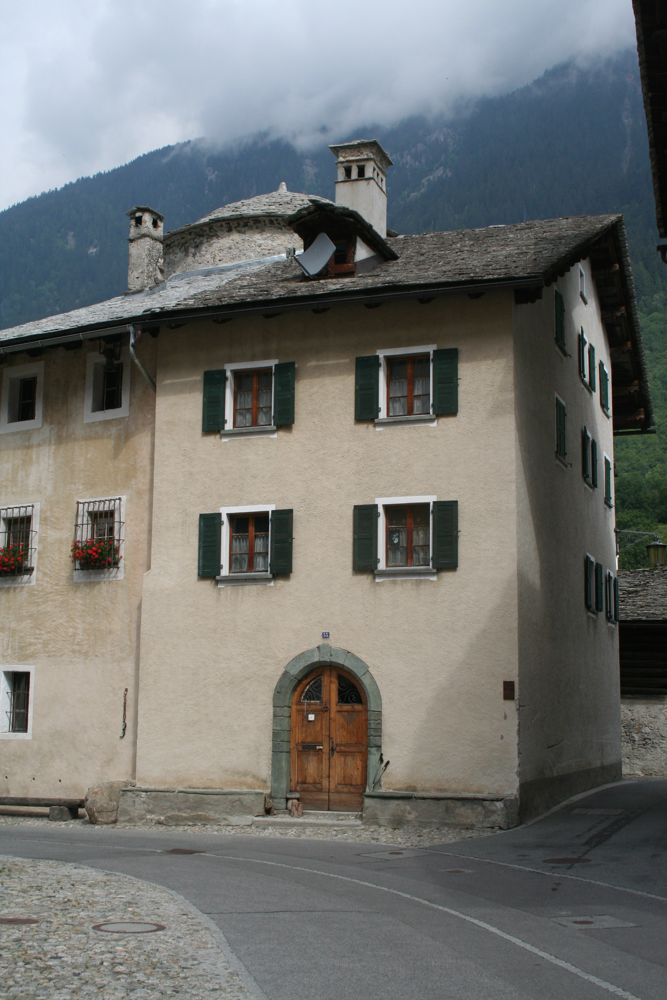 Senwelenturm in Vicosoprano: Vorderseite, links der Pranger